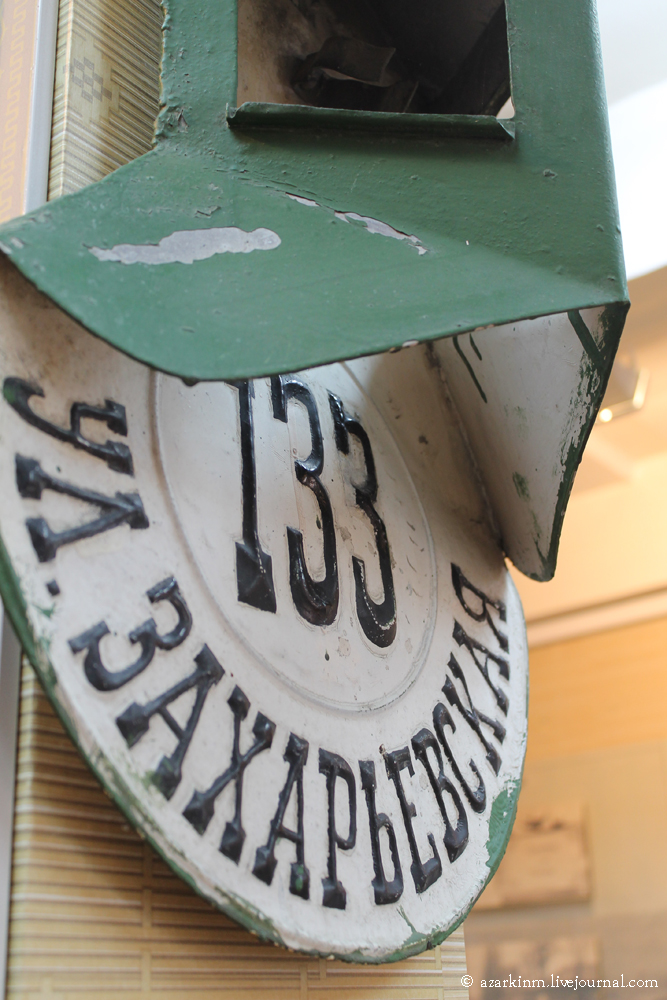 Дом-музей І з'езда РСДРП. Інтэр'ер.